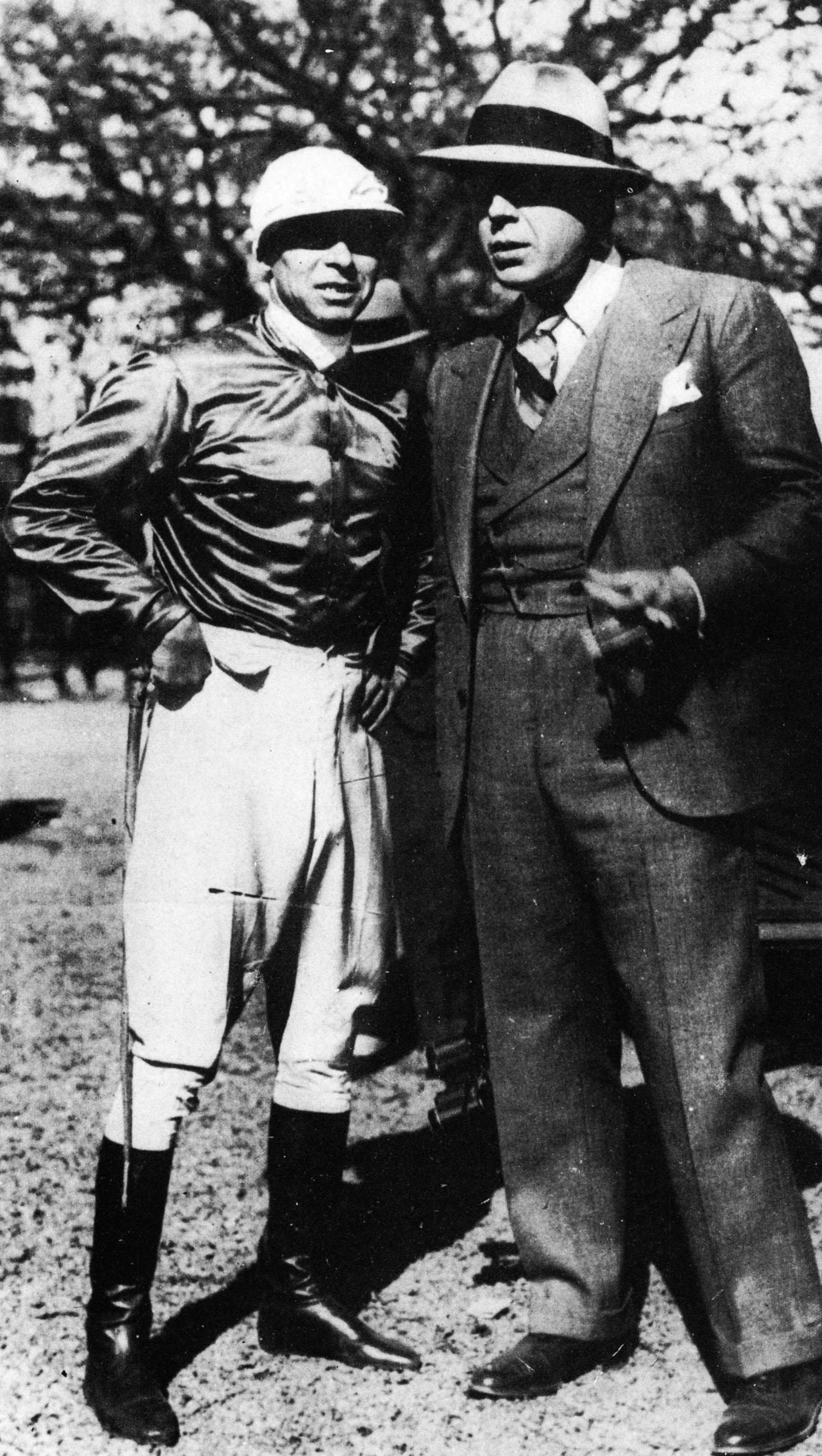 Jockey uruguayo Ireneo Leguisamo junto a Carlos Gardel en el Hipódromo de Palermo (Buenos Aires)